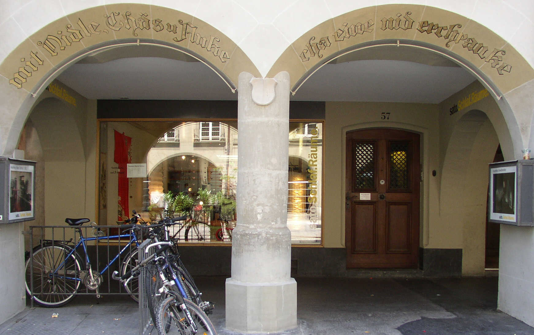 Bärndütschi Inschrift uf Arkade z Bärn in dr Grächtigkeitsgass